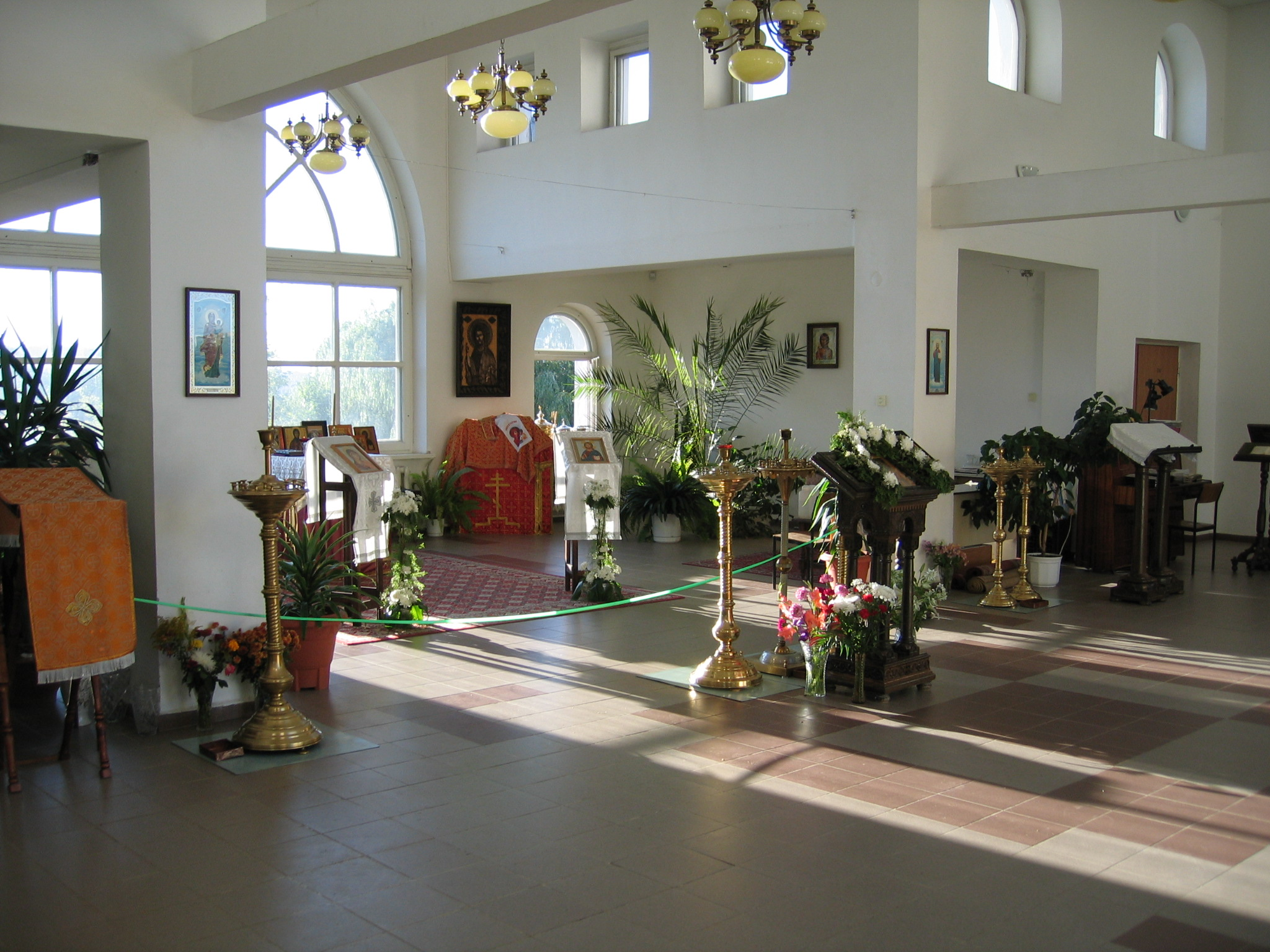 Домовая церковь в честь святых мучеников младенцев Вифлеемских